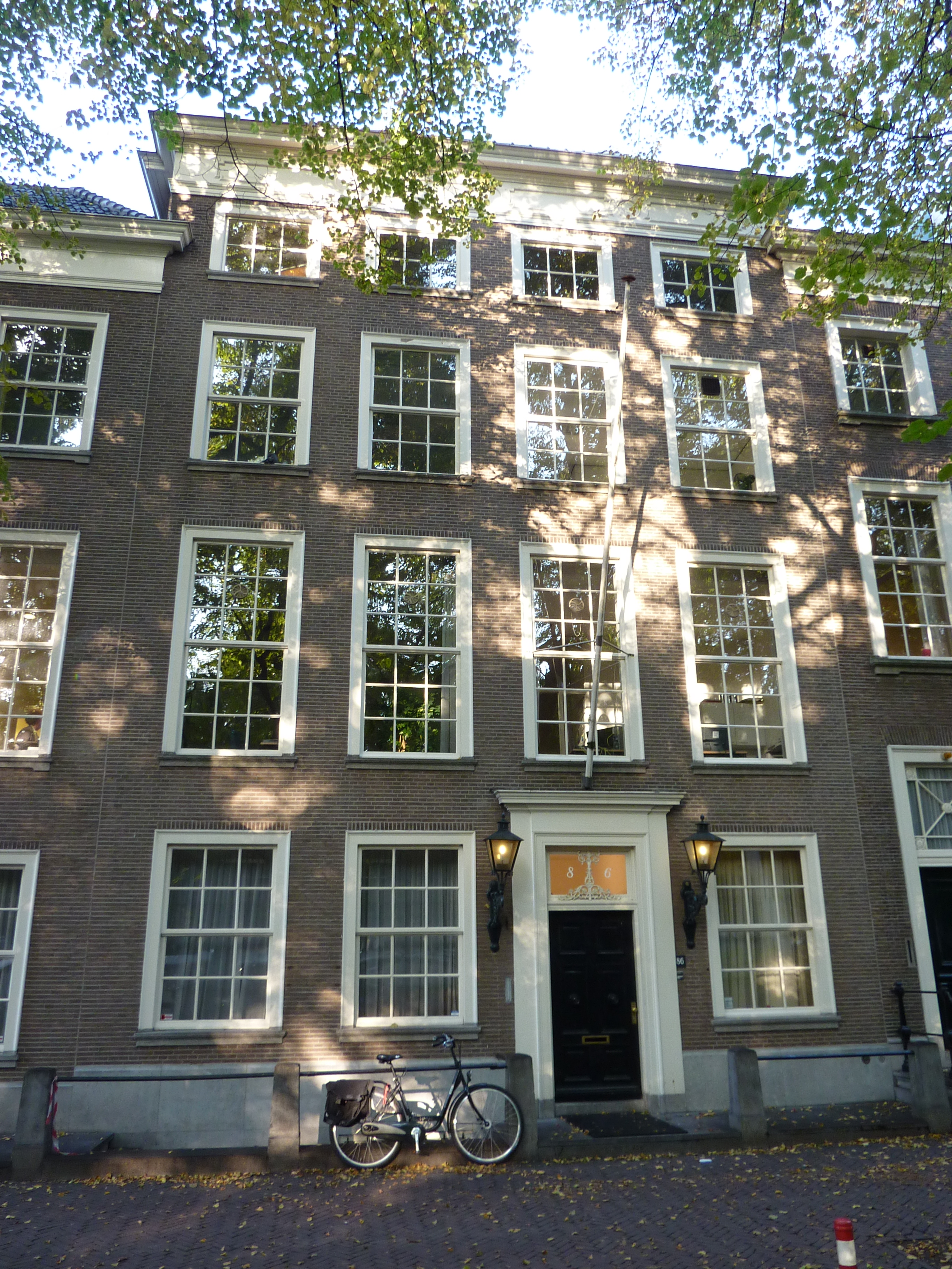 Achttiende eeuws pand aan het Lange Voorhout 86, Den Haag.